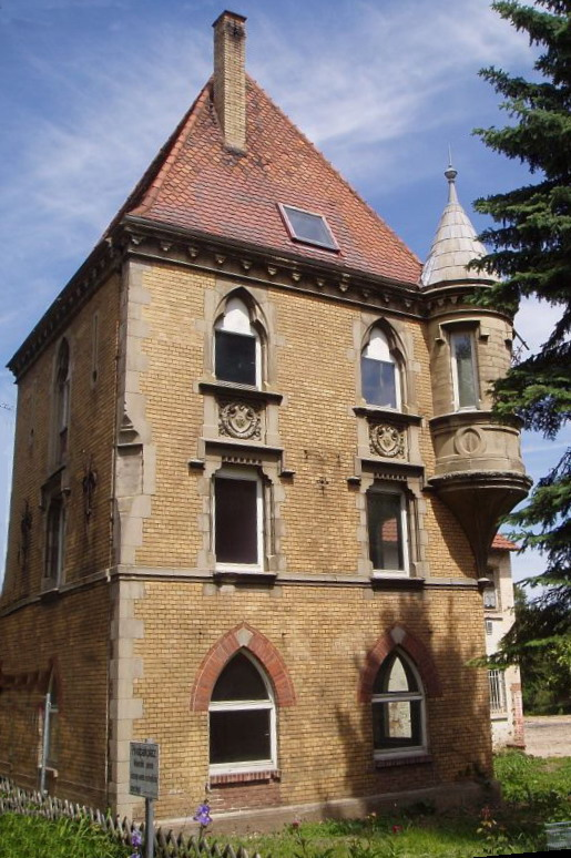 Esslingen am Neckar - Weil - Gestütsgebäude Fotografiert: selbst